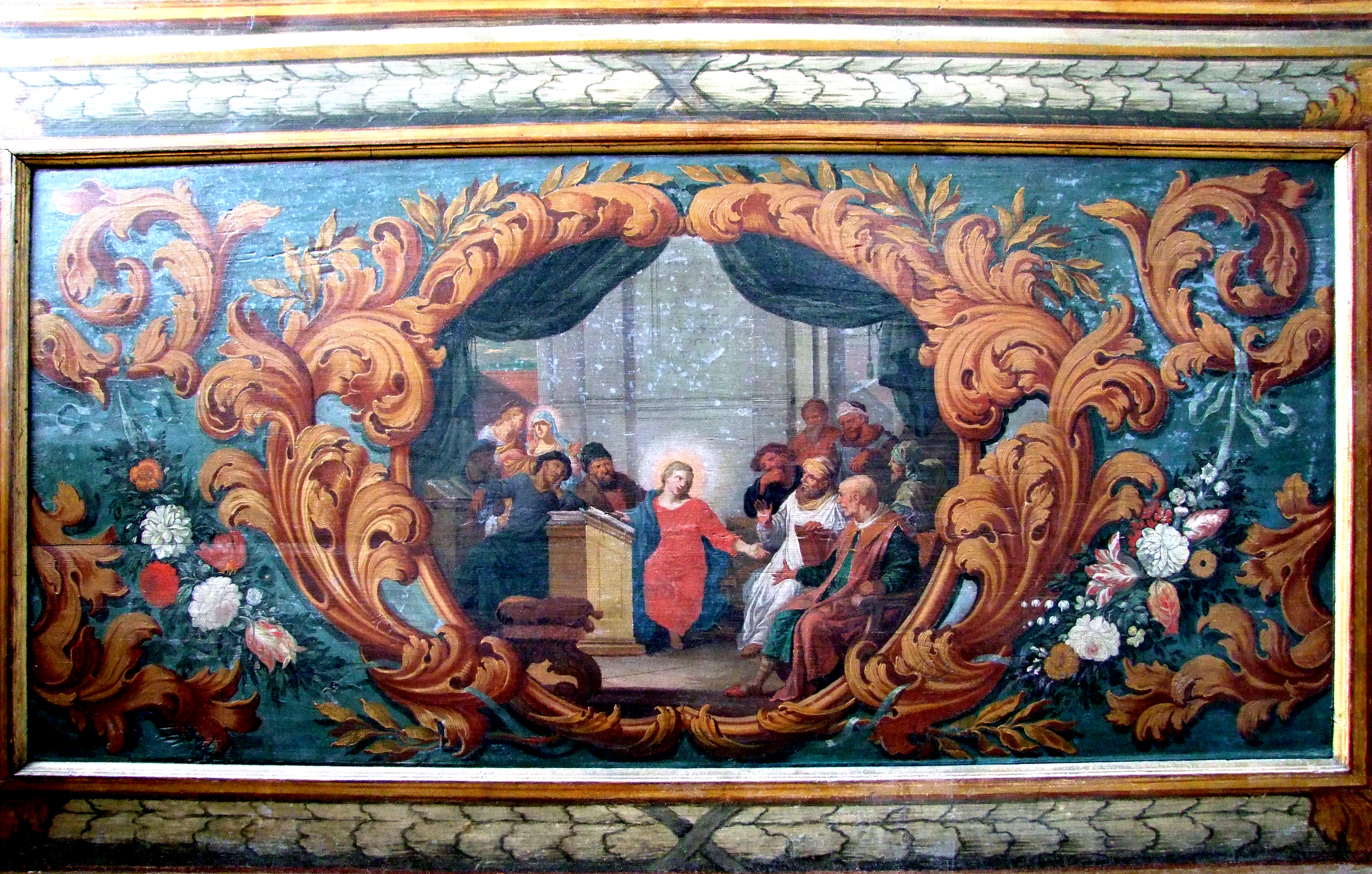 St. Maria im oberschwäbischen Buxheim bei Memmingen. Holzantependium des nördlichen Lettneraltars "Der zwölfjährige Jesus im Tempel"